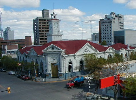 Vista del Banco Nación en Trelew (2008)